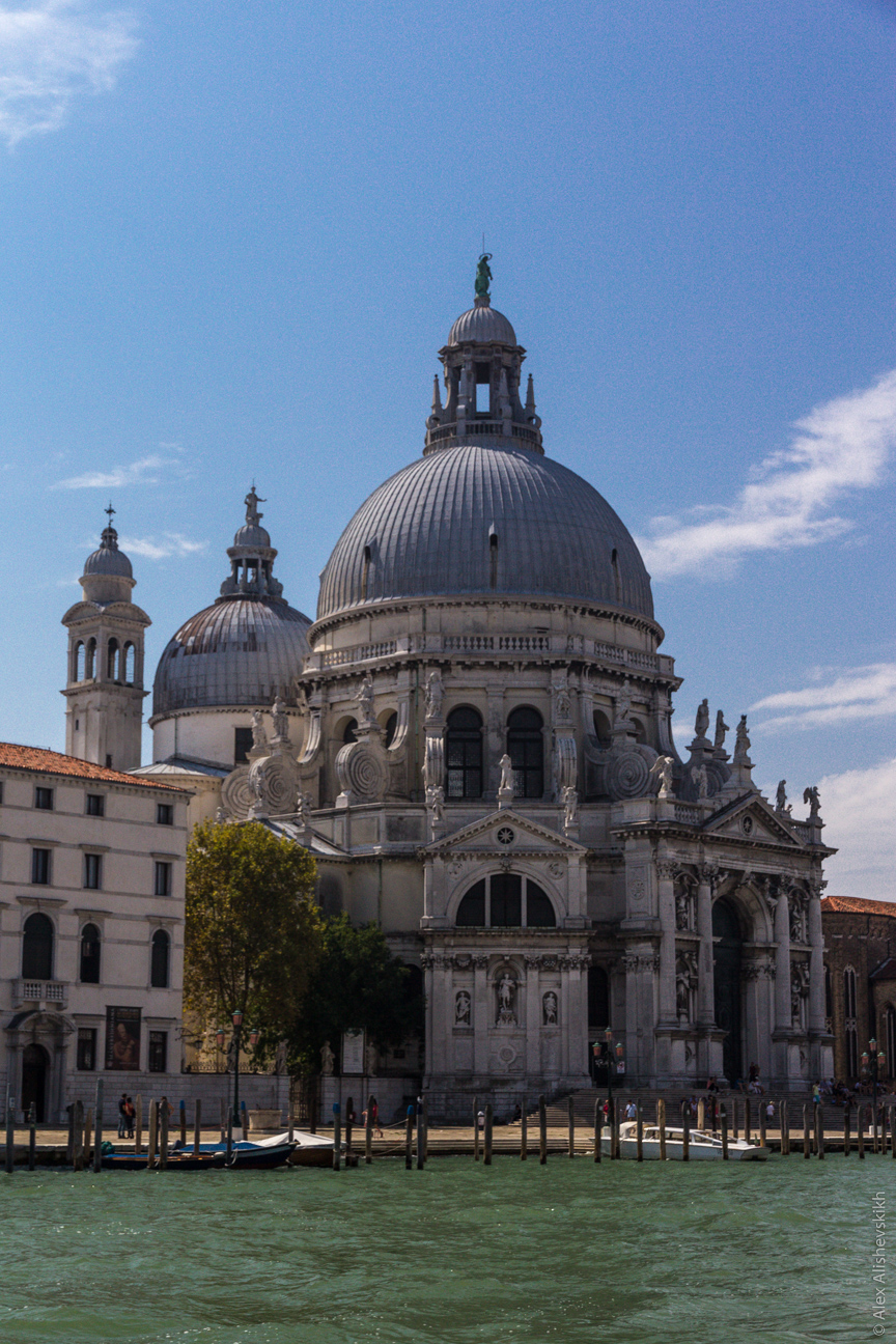 Santa Maria della Salute